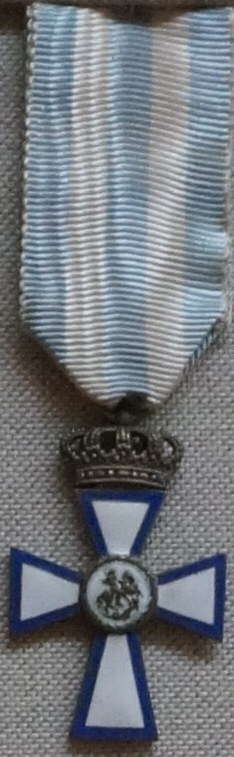 présenté au musée de la guerre de Salonique.